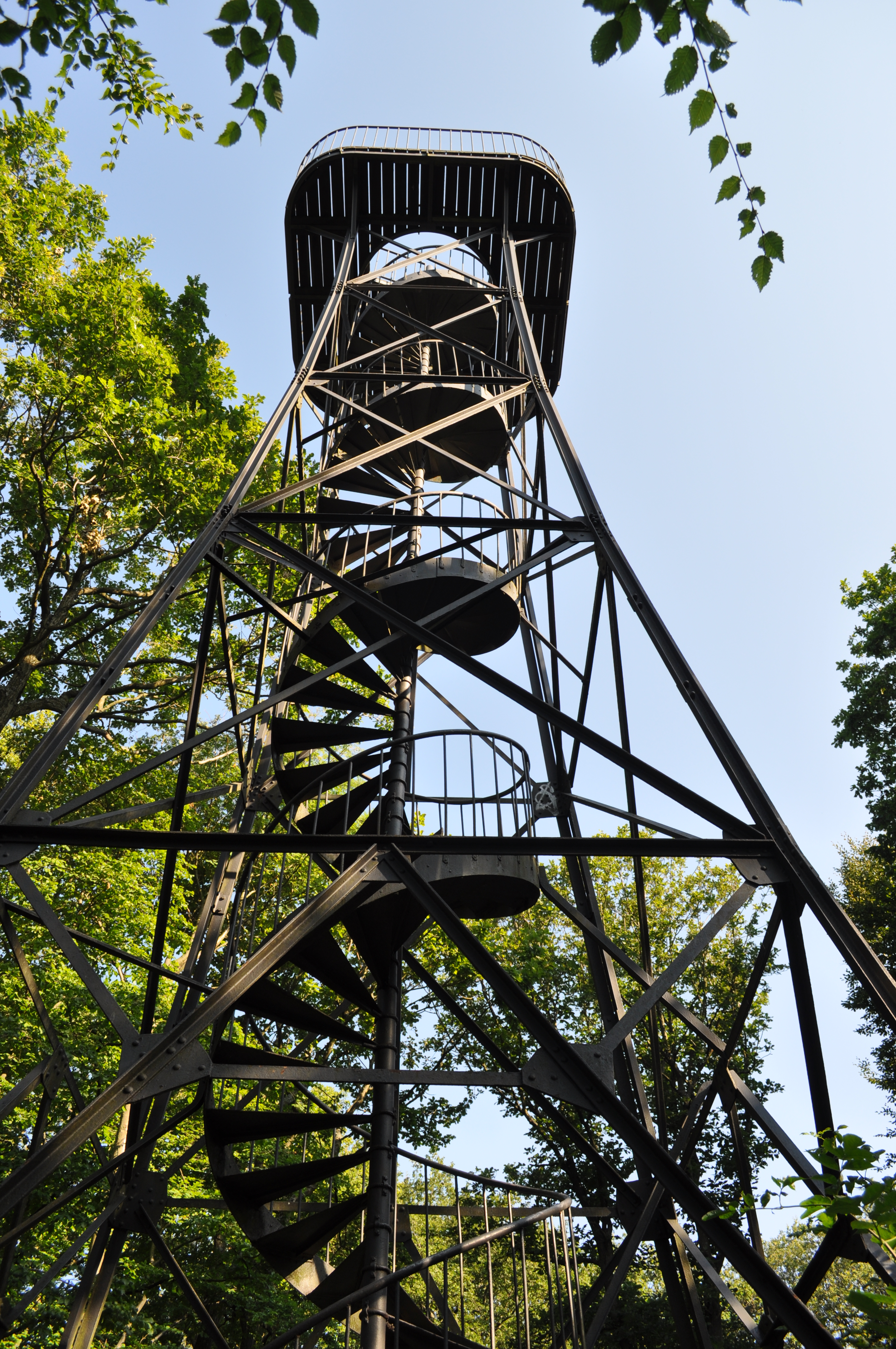 Königstein im Taunus, Hardtbergturm